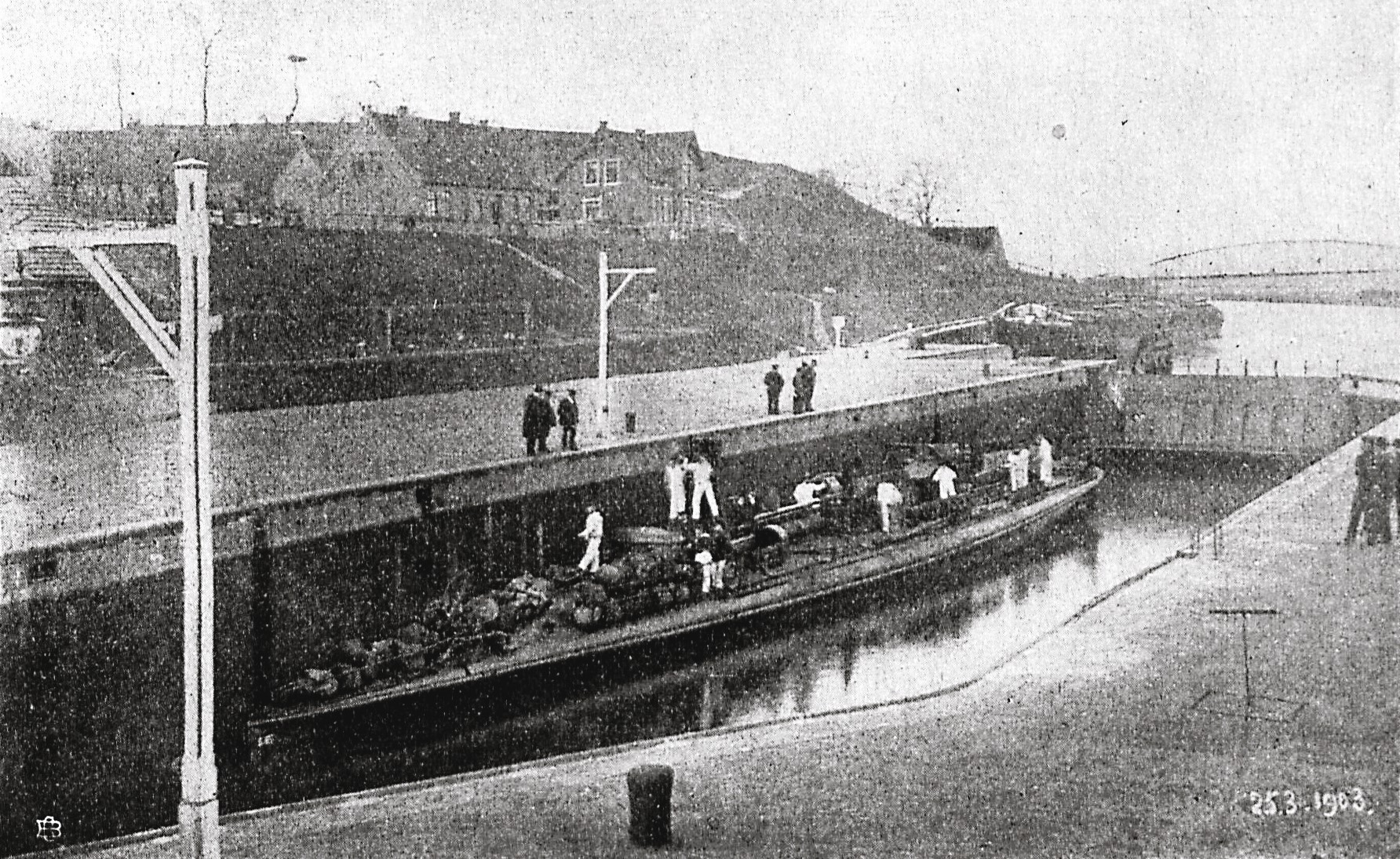 Das erste Kriegsschiff auf dem Elbe-Trave-Kanal. Torpedoboot S. 65 in der Endscleuse des Kanals bei Lauenburg. Dieses Bild wurde in "Elbe-Lübeck-Kanal: Vom Handelsweg zur Touristen-Oase", NDR 1 Welle Nord, 19. Mai 2020, verwendet.